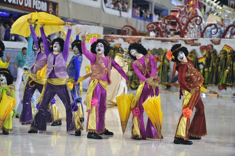 Desfile de 2011 da Acadêmicos de Santa Cruz. Foto: Ricardo Almeida.